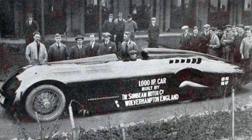 La 'Mystery Z' 1 000HP d'Henry Segrave sortant des usines Sunbeam à Wolverhampton, pour aller battre aux USA le RM de vitesse à Daytona Beam (1927, à plus de 200mph)